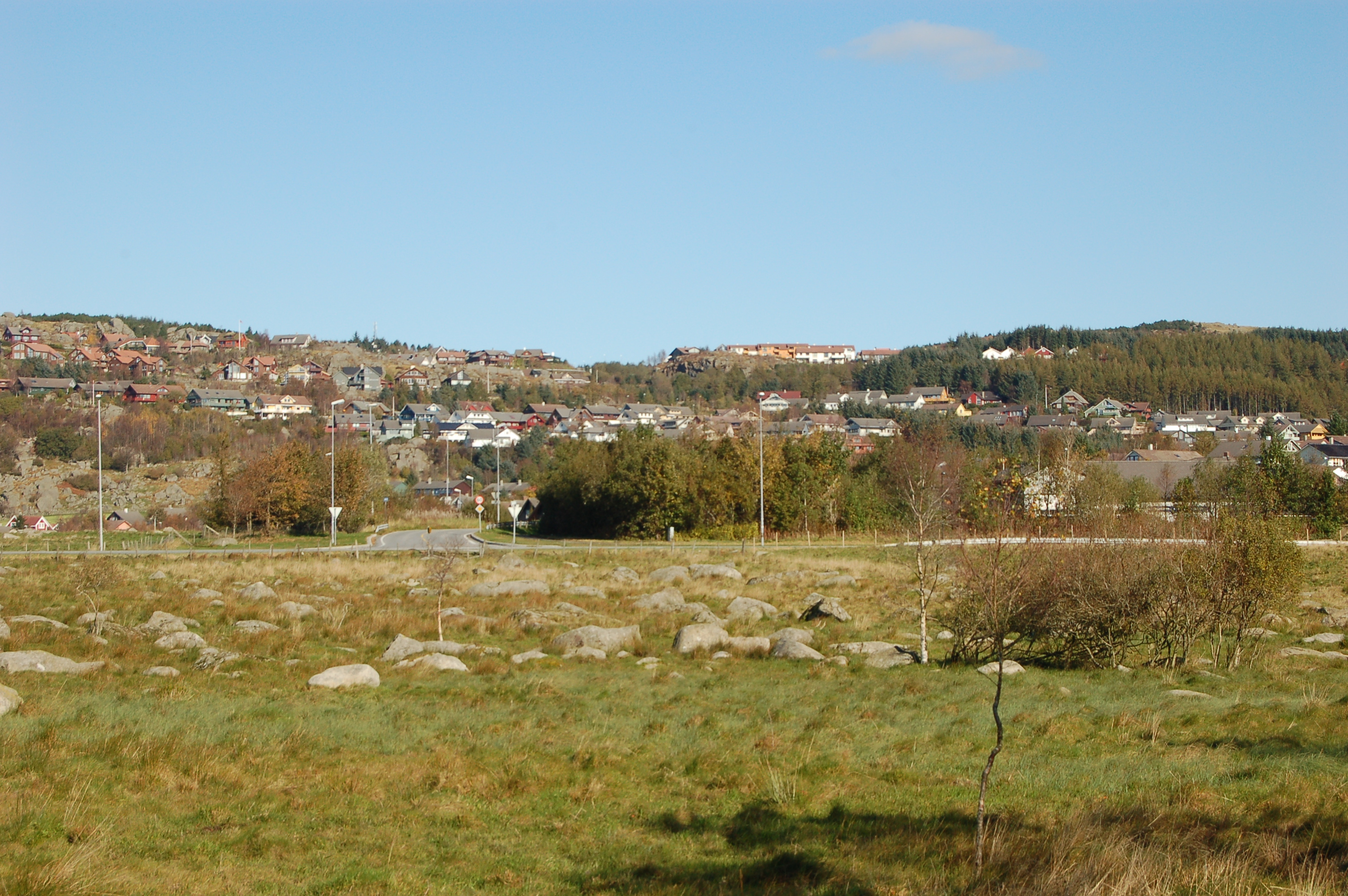 Lyefjell, Time, Rogaland, Norway